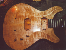 Gitarre in der Entstehung bei Formentera Guitars (Bild: Marcel Grieder, thegrid)